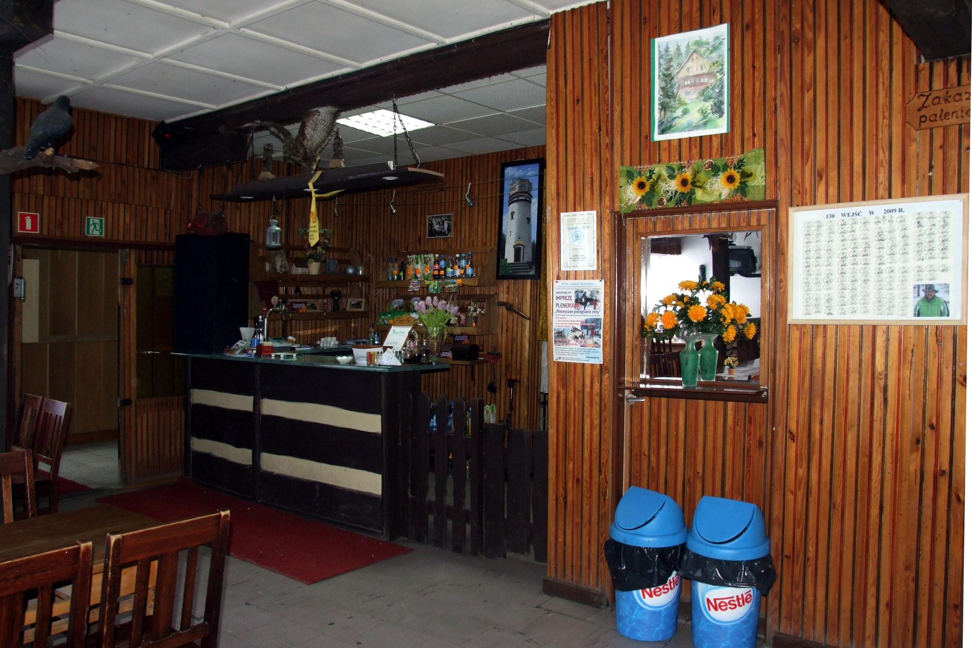 Schronisko PTTK "Pod Kopą Biskupią" (dawne "Oberschlesierbaude") - bufet